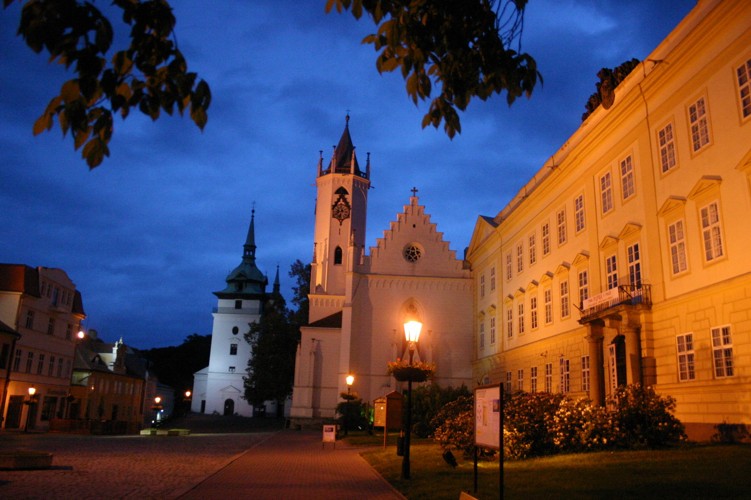 Teplice, Zámecké náměstí.